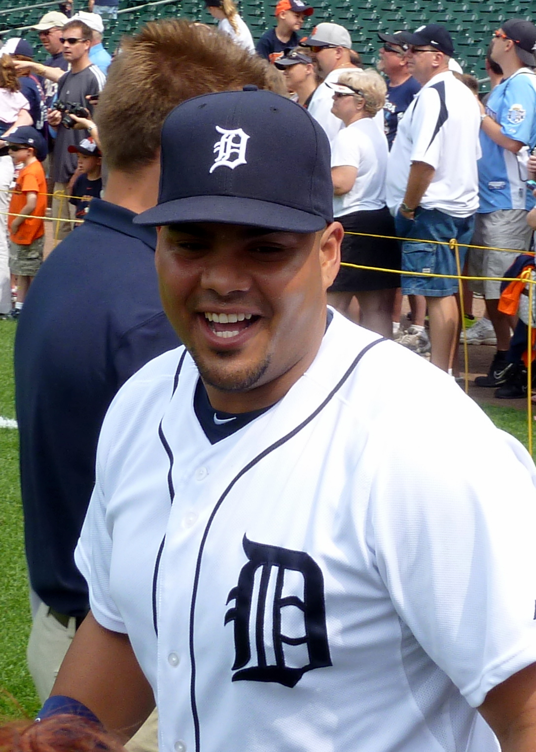 Brayan Peña